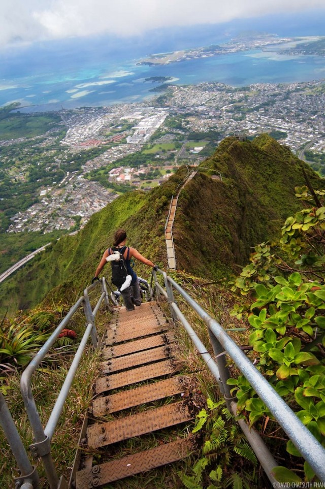 Лестница в небо